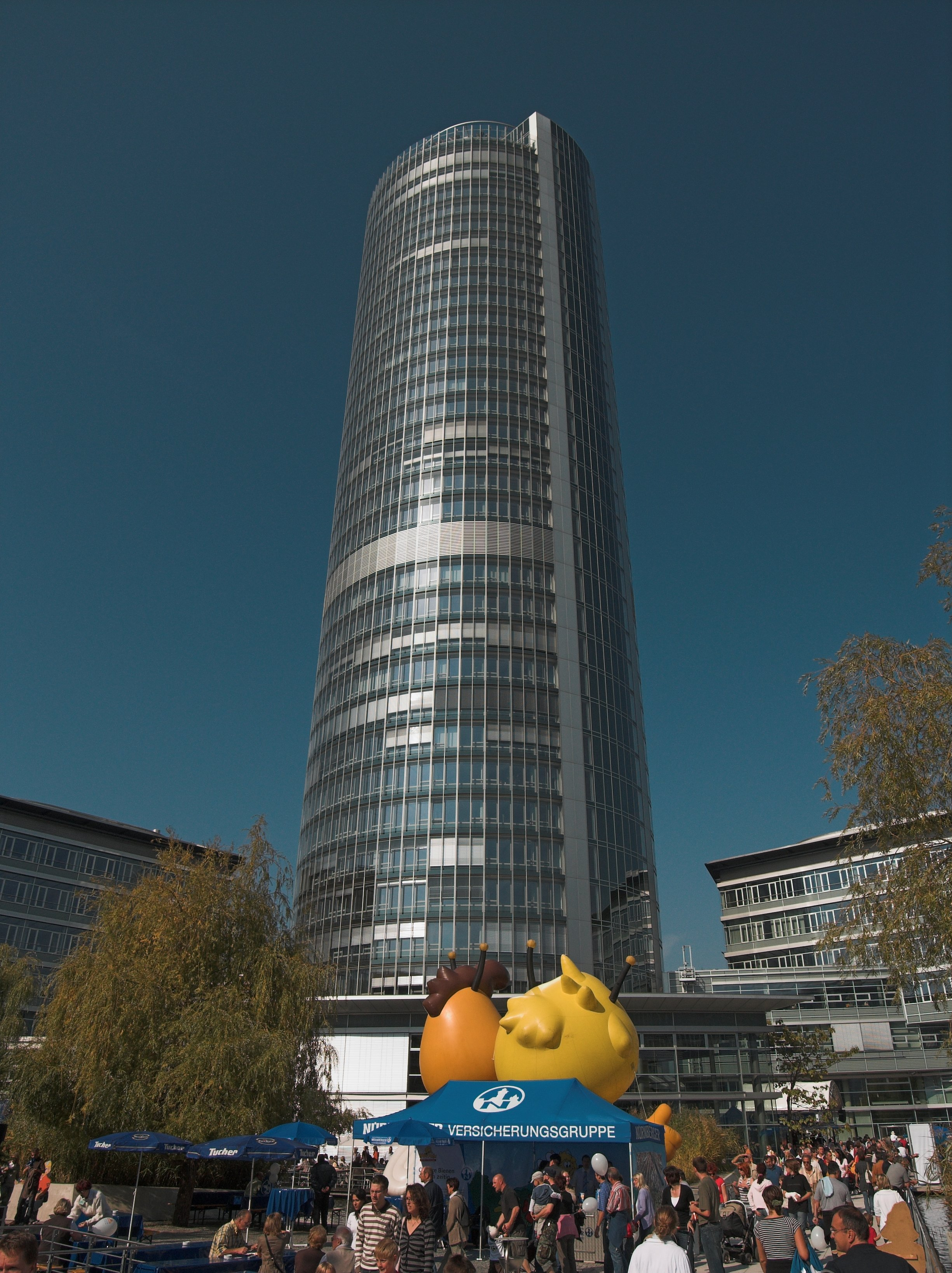 Büroturm der Nürnberger Versicherung in Nürnberg